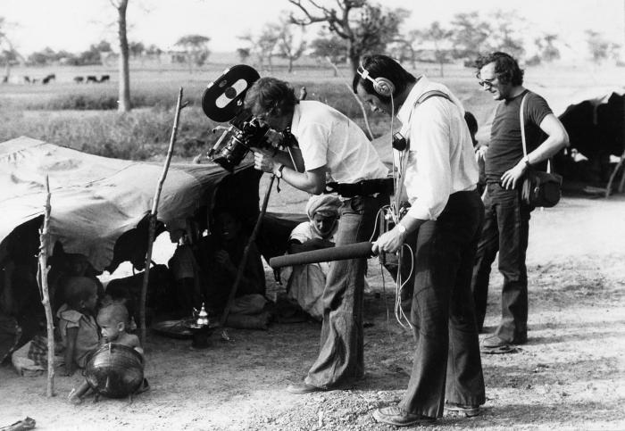 De opnamen van het Sahel Team werden vermoedelijk uitgezonden in de Hier en Nu uitzending van 17 januari 1973 over vluchtelingen uit Sudan. De beelden kunnen ook gebruikt zijn tijdens de NOS special 'Aktie SOS Sahel' op 17 oktober 1973; 'korte shots Sahellanden, droogte en bevolking' (informatie: archief Beeld en Geluid) De fotograaf Broekhuijse heeft ook nog enkele detailopnamen van het kind gemaakt, deze zijn onder inventarisnummers 20010131 en 20010132 opgenomen in de collectie. Een nagenoeg identieke opname is te vinden onder inventarisnummer 20010614.